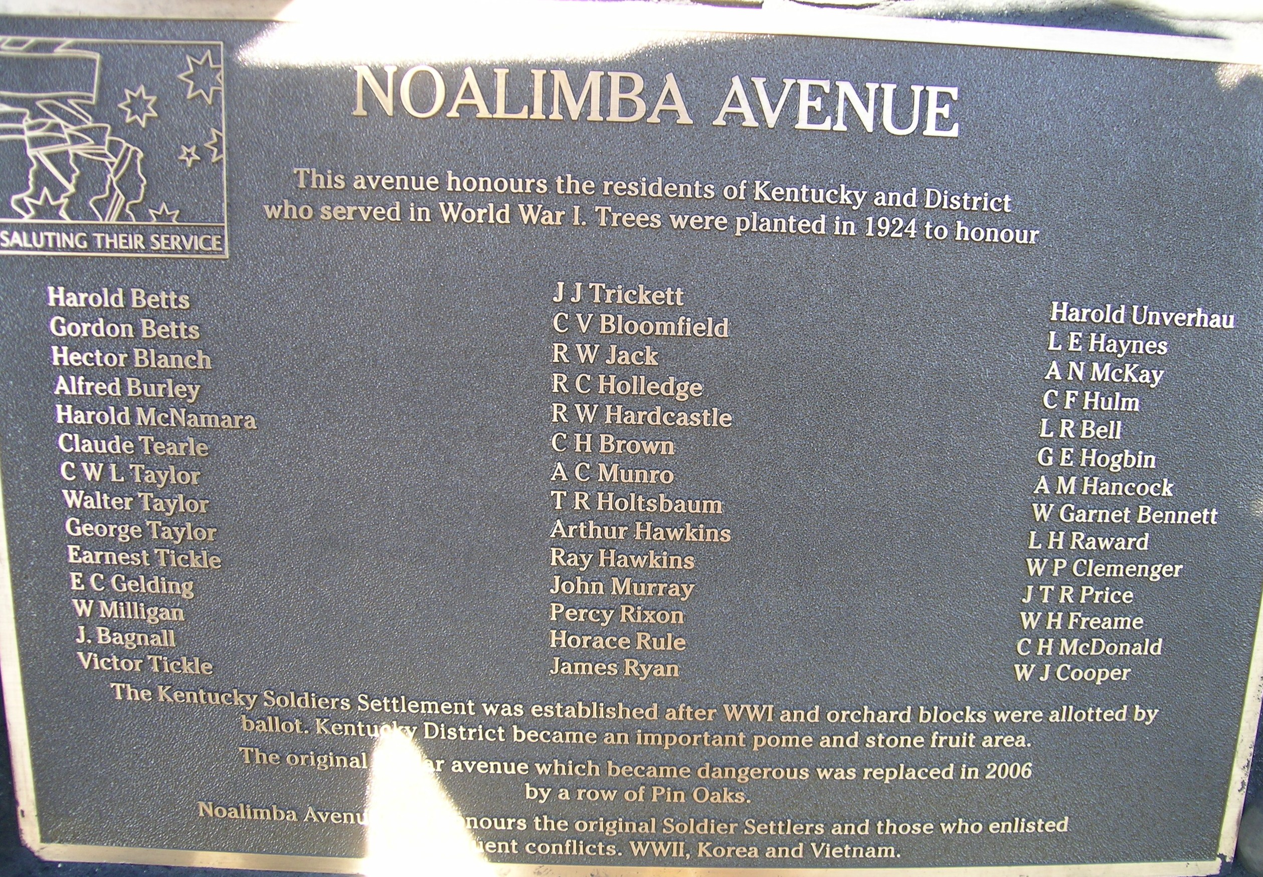 Noalimba Avenue Memorial, Kentucky, NSW